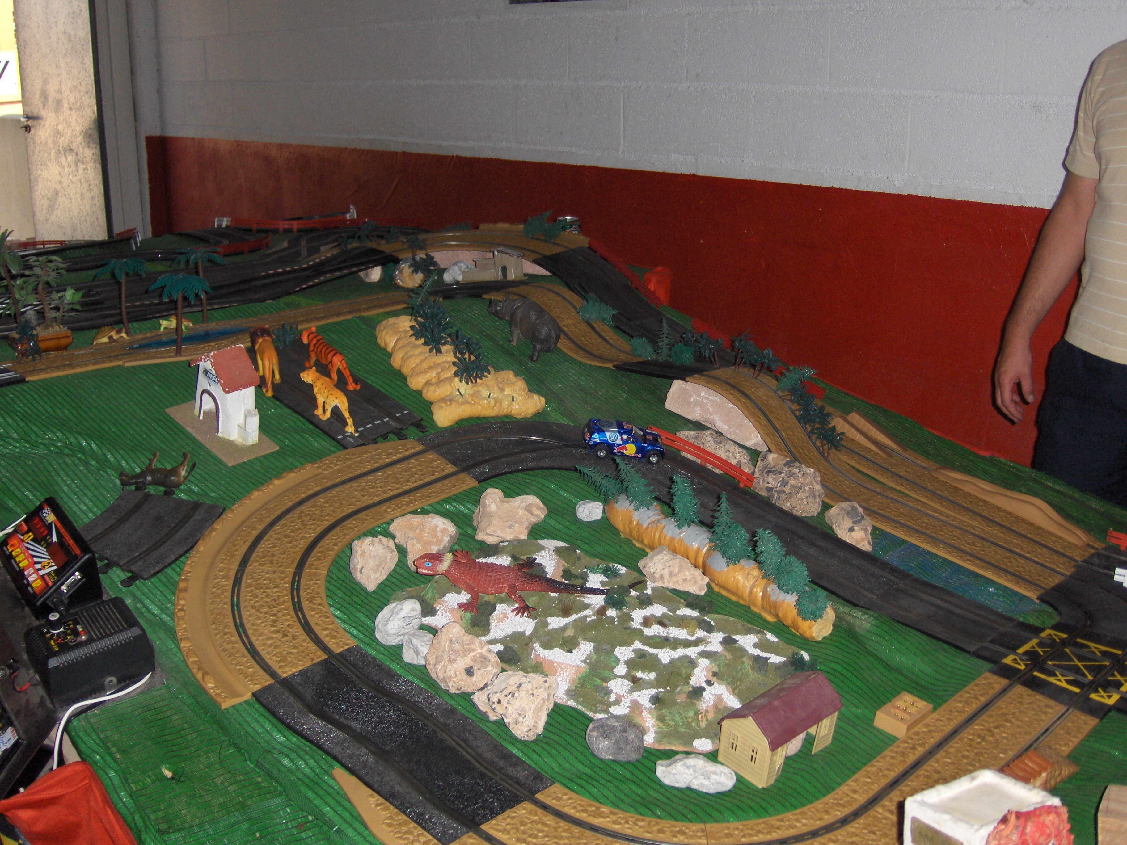 Modelová autodráha